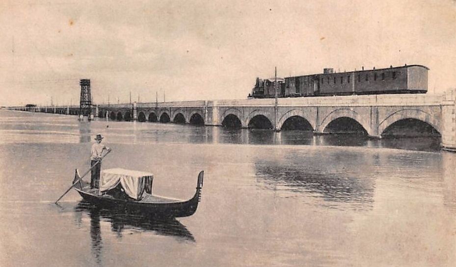 Ponte della ferrovia sulla Laguna di Venezia